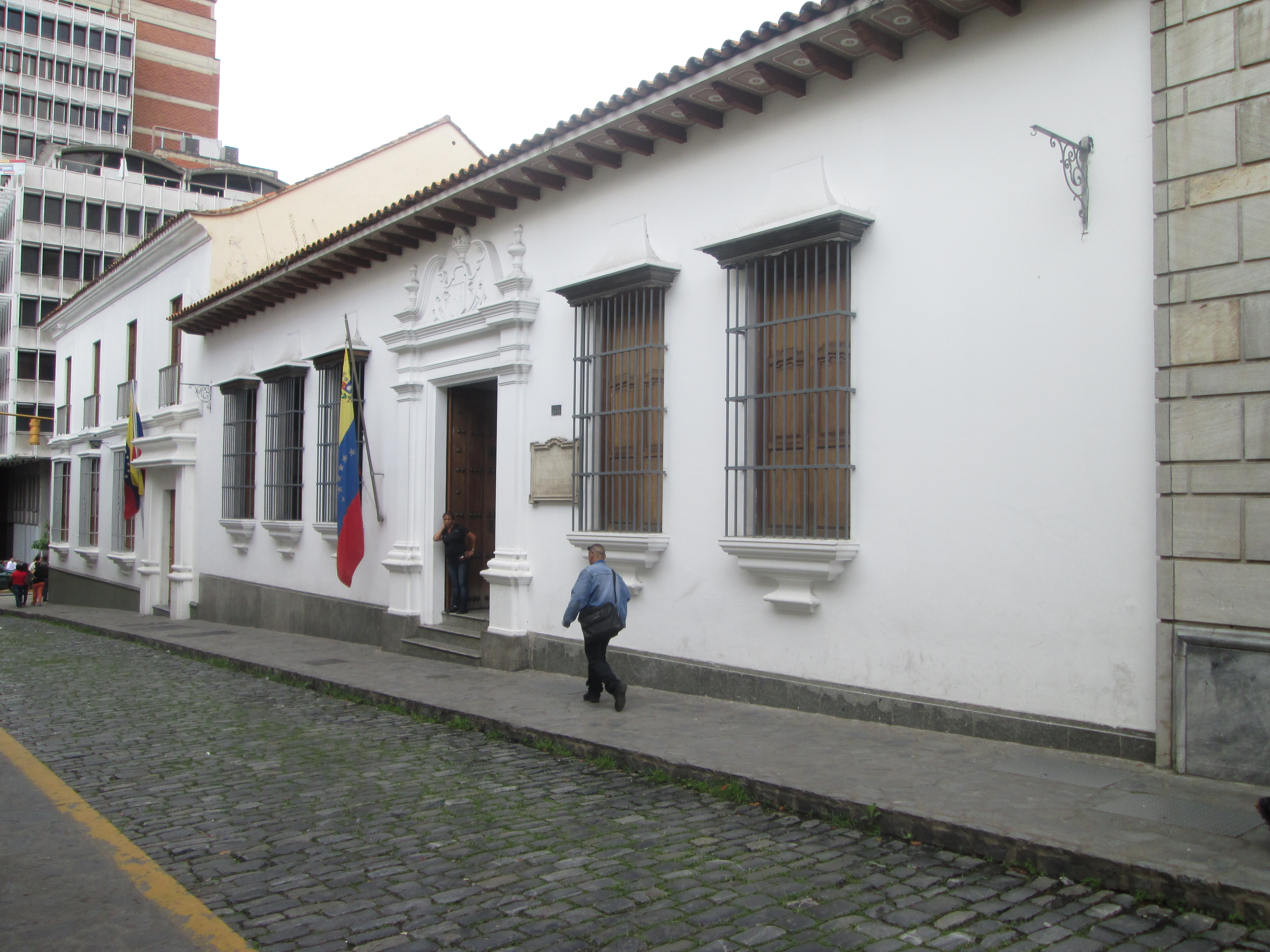 Fachada completa de la Sociedad Bolivariana